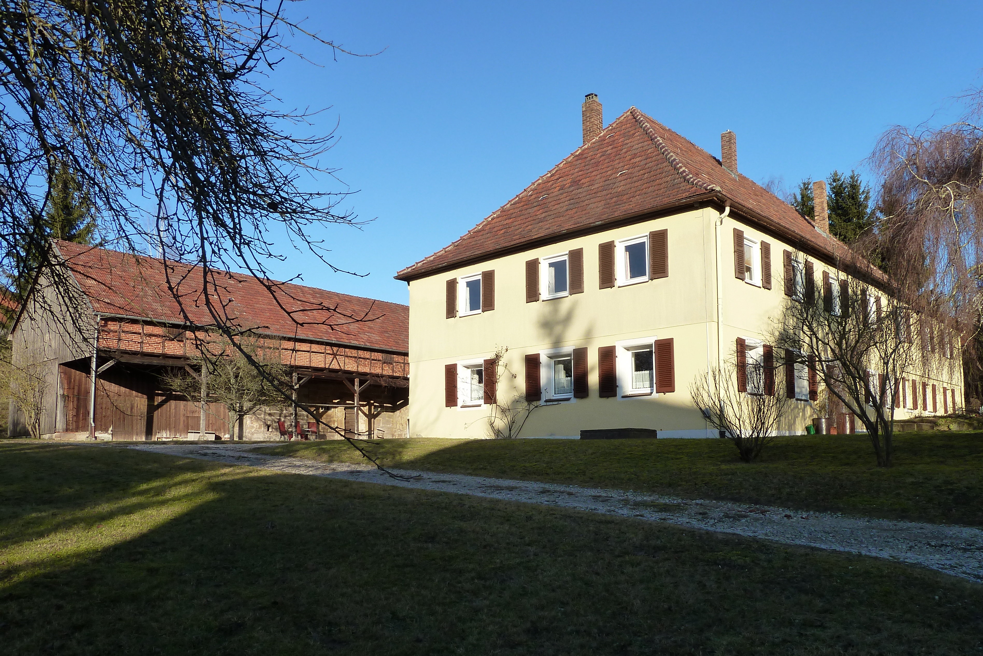 Denkmalgeschützte Viereckanlage in Waldsachsen, Waldsachsener Straße 11, OT von Rödental